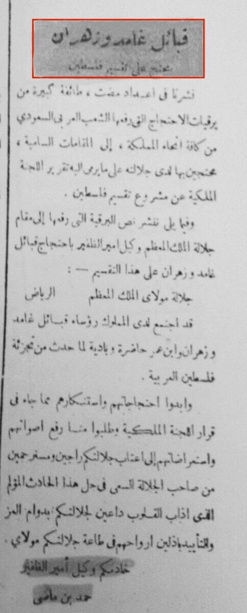 احتجاج من قبالئل غامد وزهران على تقسيم فلسطين 1948 وفع عن طريق وكيل إمارة الظفير -انذاك حمد الماضي